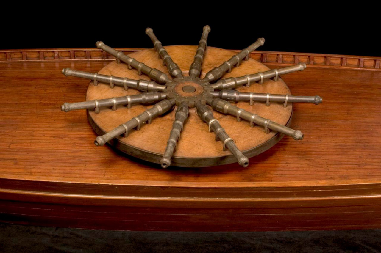 Il modello è costituito da una sezione di scafo di imbarcazione su cui è installato una torretta di artiglieria, composta da un disco rotante su cui sono disposte dodici bocche da fuoco (opposte a due a due) Funzione Il modello rappresenta una bombarda multipla ad uso navale Modalità d'uso Questo modello è pensato per essere posizionato sul ponte di una nave: dodici cannoni di modeste dimensioni, probabilmente già a retrocarica, sono montati simmetricamente su una piattaforma girevole e possono essere azionati da una persona sola. Le bomabrde sono disposte radialmente in modo da consentire il tiro simultaneo in opposizione, in modo tale che il rinculo successivo agli spari fosse riequilibrato e la nave non subisse pericolosi movimenti translatori e oscillatori. La presenza di più bombarde permetteva inoltre tiri in rapida successione